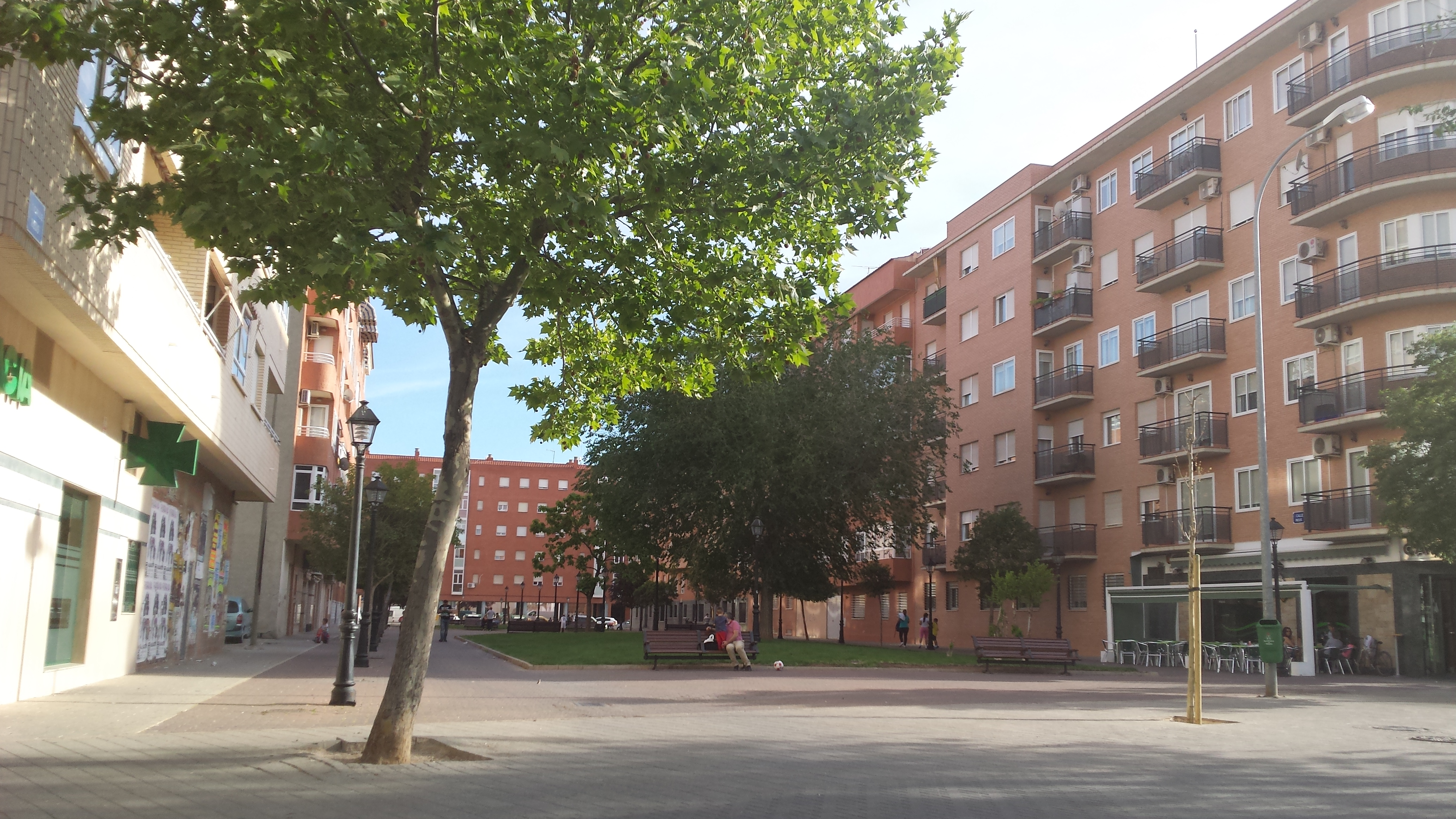 Plaza del barrio Canal de María Cristina. Albacete